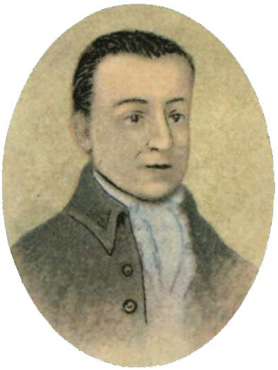 La imagen de Juan Martínez de Rozas, pertenece al proyecto El Diputado Bernardo Ohiggins en el Congreso de 1811